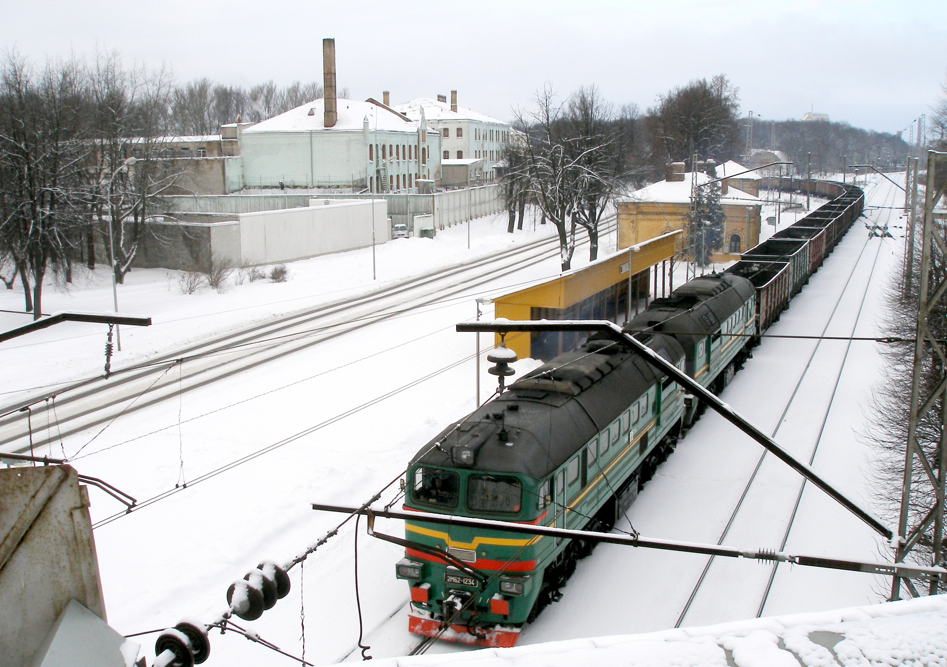 Brasas stacija (skats Sarkandaugavas virzienā no Brasas tilta). Pusvagonu sastāvs dodas no Rīgas Krasta stacijas Zemitānu virzienā.